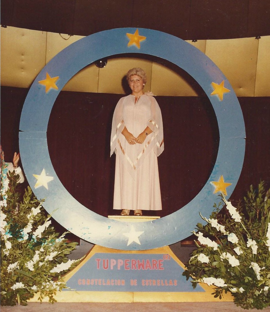 Josefina a Madrid, premiada com a millor distribuïdora Tupperware de la província.